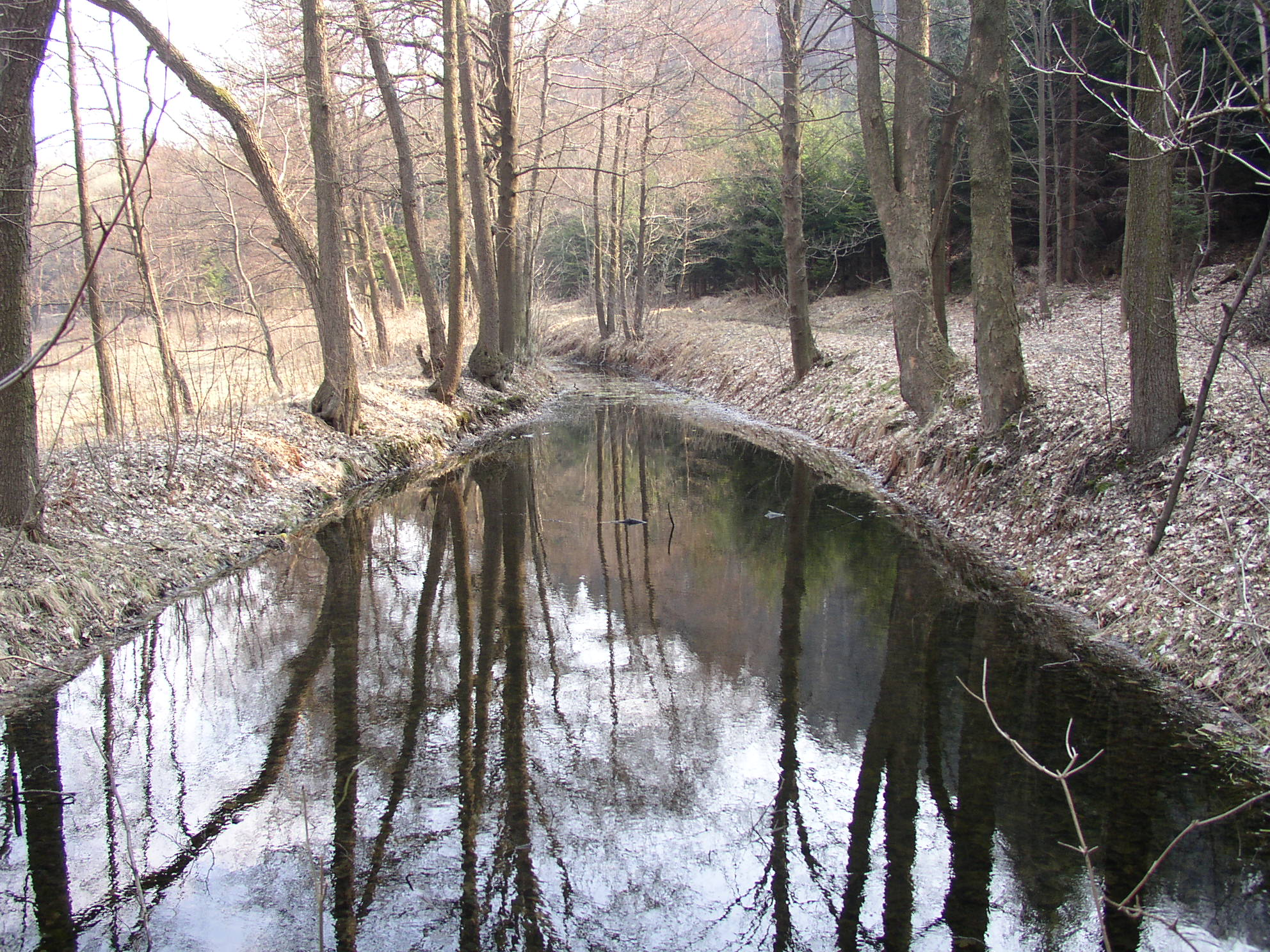 Nádrž k náhonu bývalému mlýnu v Lesné, Jiřetín pod Jedlovou, okres Děčín, Ústecký kraj, Česká republika